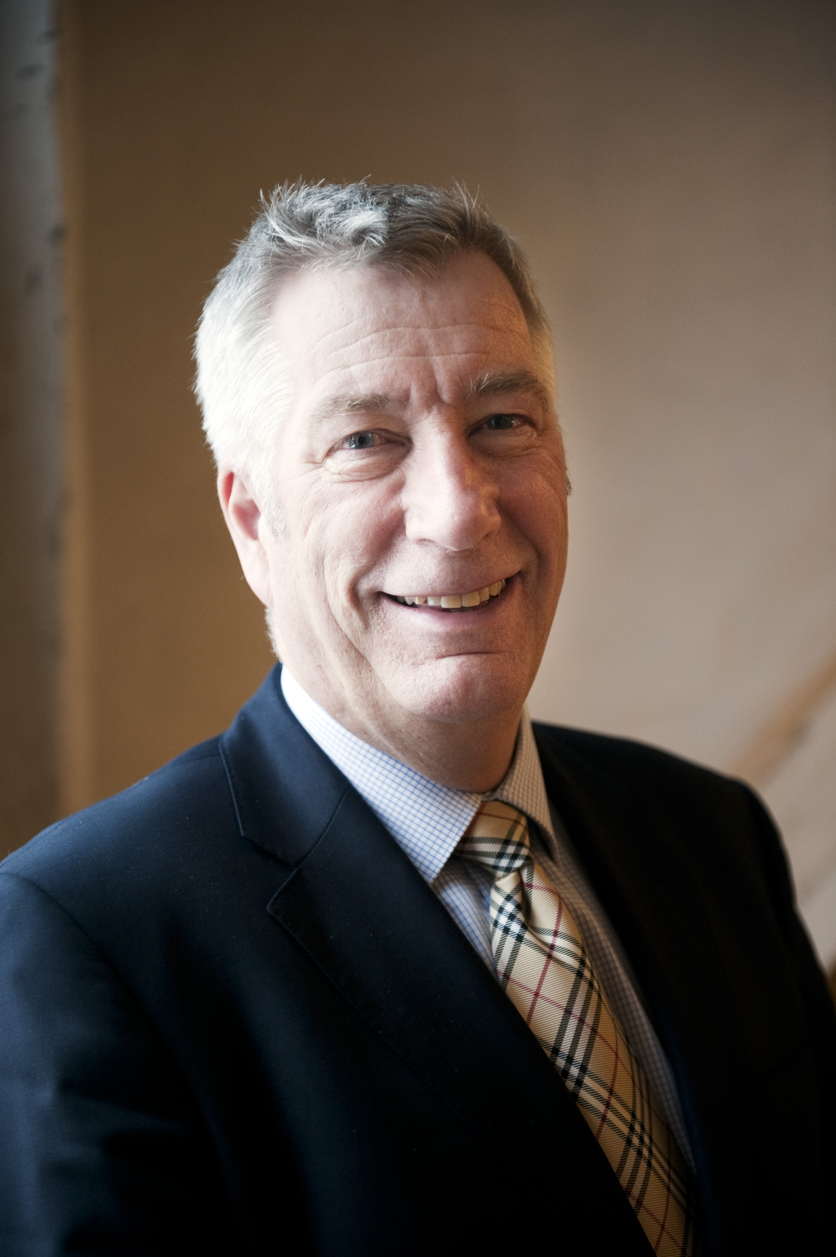 Norges finansminister Sigbjørn Johnsen. Nordiskt finansministermöte i Köpenhamn 2009-12-04